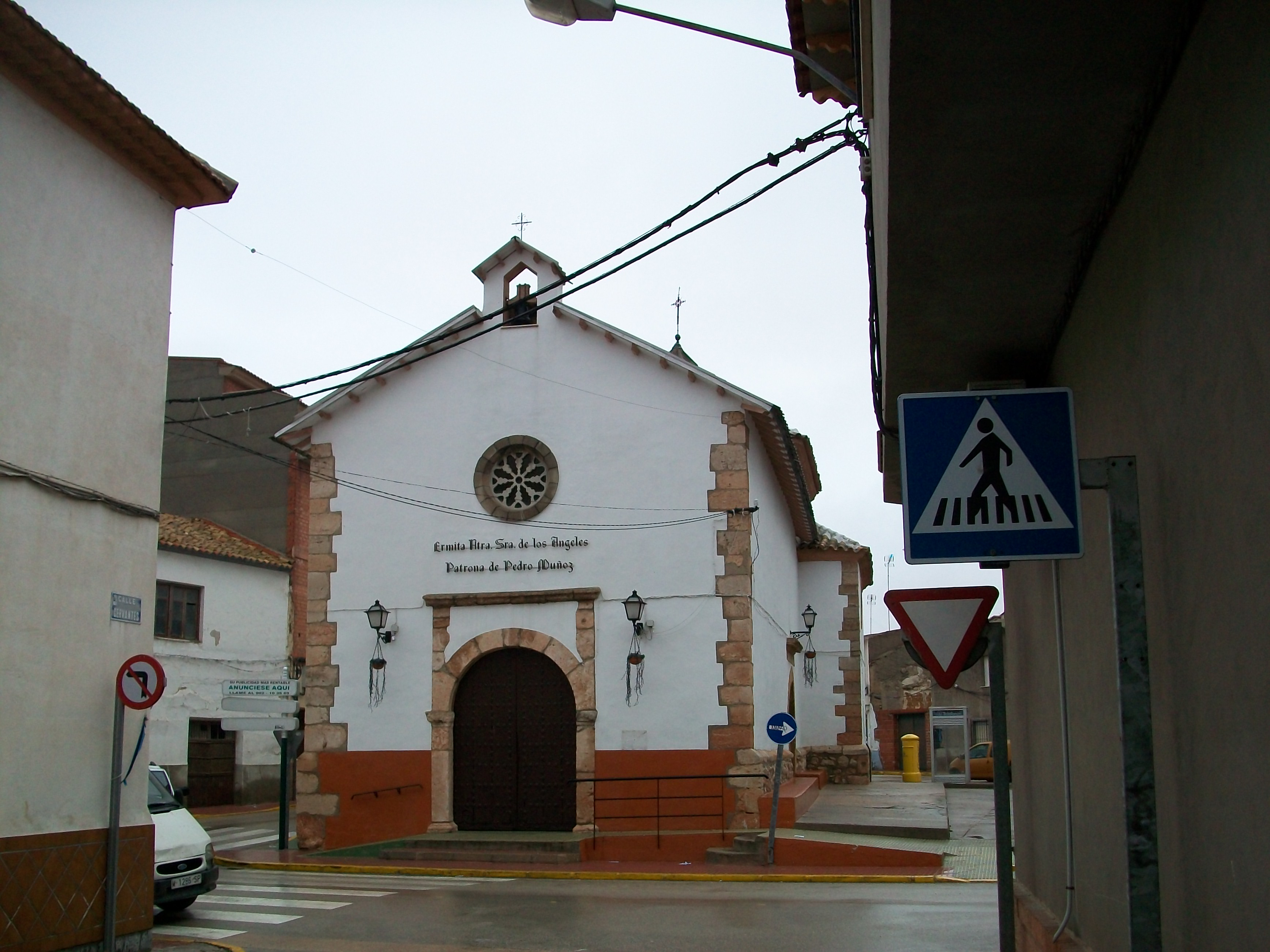 Ermita de Nuestra Señora de los Ángeles en Pedro Muñoz (Ciudad Real).